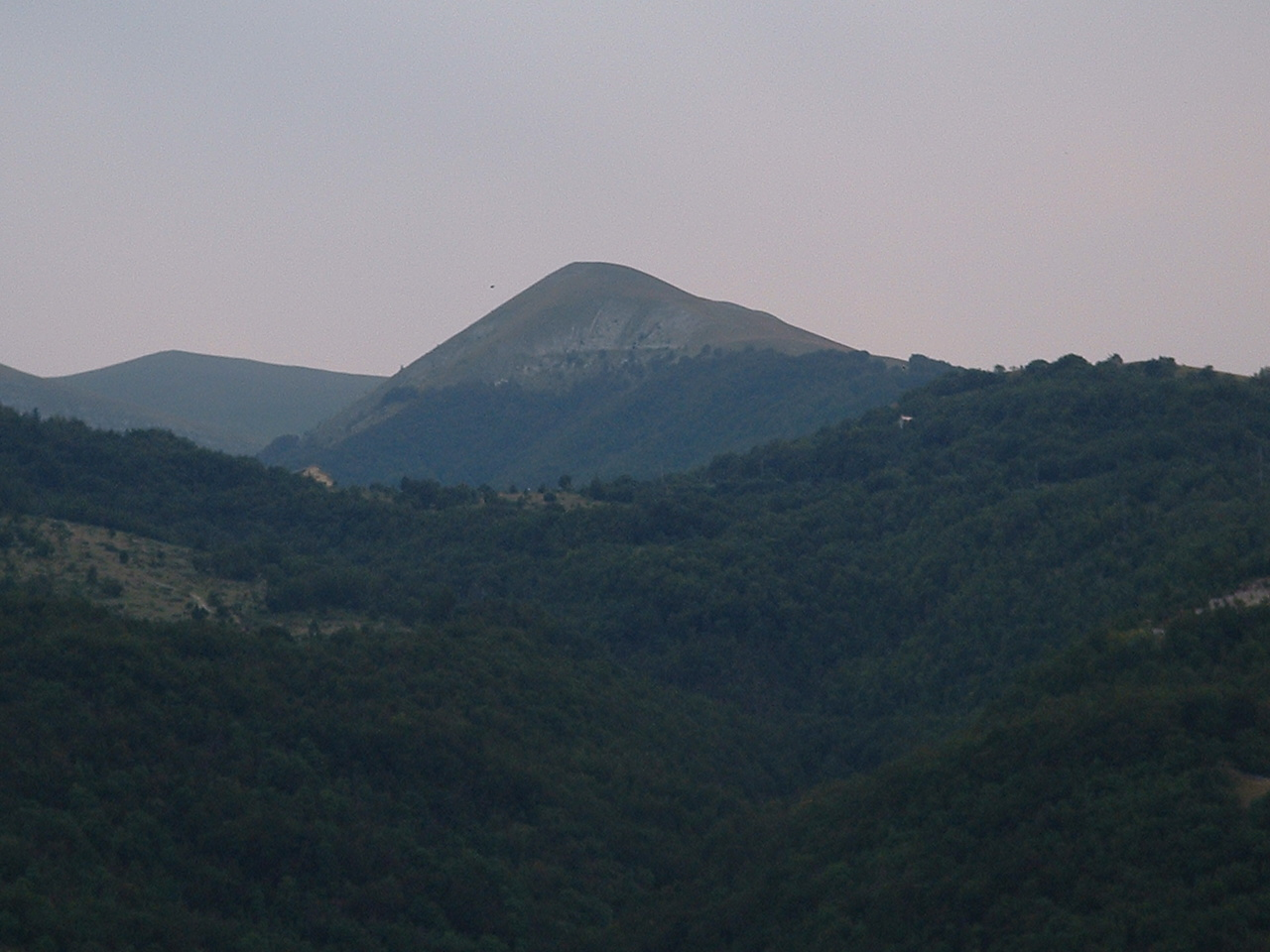 Spina di Gualdo